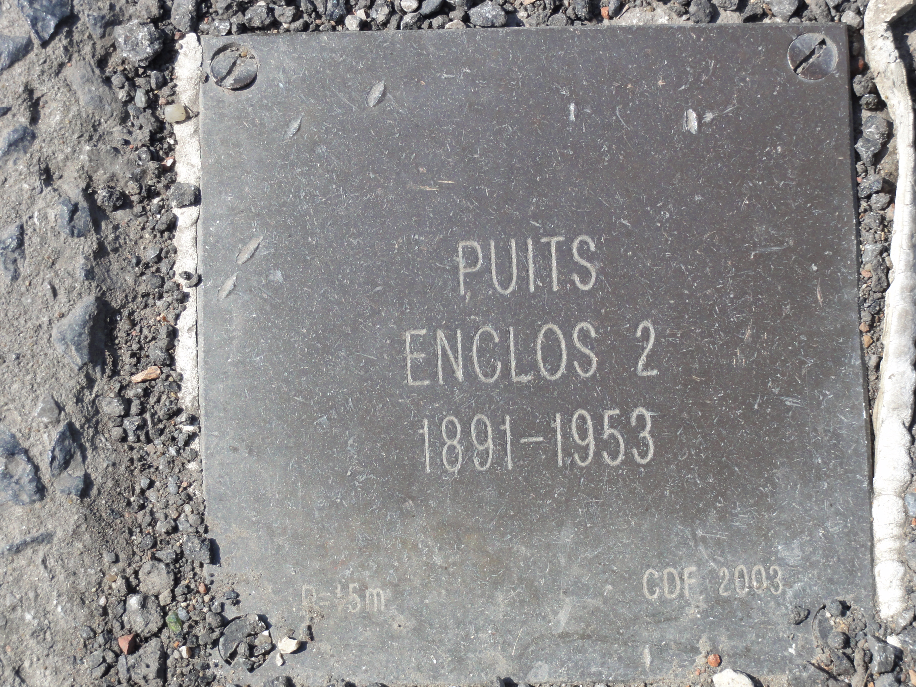 La Fosse Enclos ou l'Enclos de la Compagnie des mines d'Anzin était un charbonnage constitué de deux puits situé à Denain, Nord, Nord-Pas-de-Calais, France.